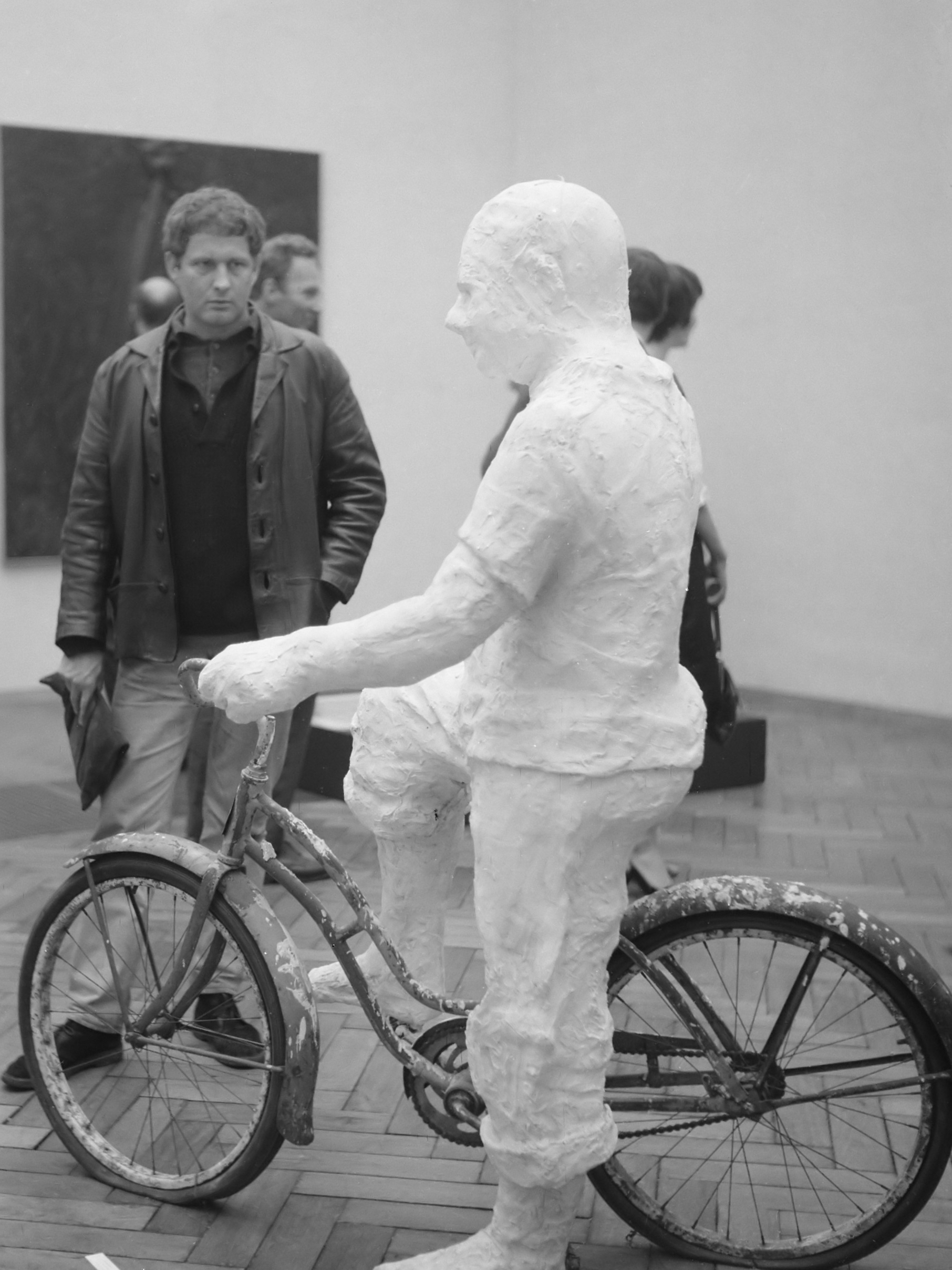 "American Pop Art" expositie in het Stedelijk Museum, Jan Wolkers bij een werk van George Segal "Man on a bicycle" 22 juni 1964